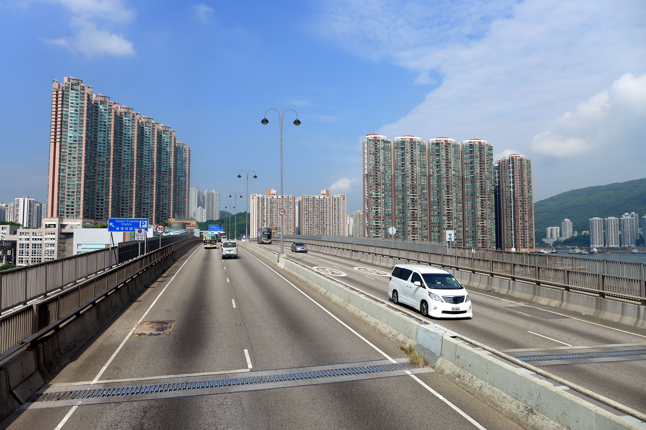 Tsing Tsuen Road